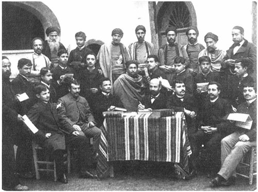 Educator David Cazes (beyond the desk) and a group of teachers and rabbis, Tunis, 1887.